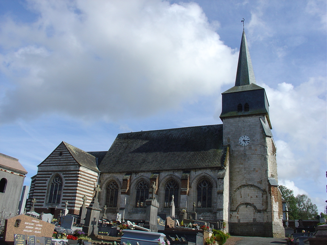 Église de Lisbourg